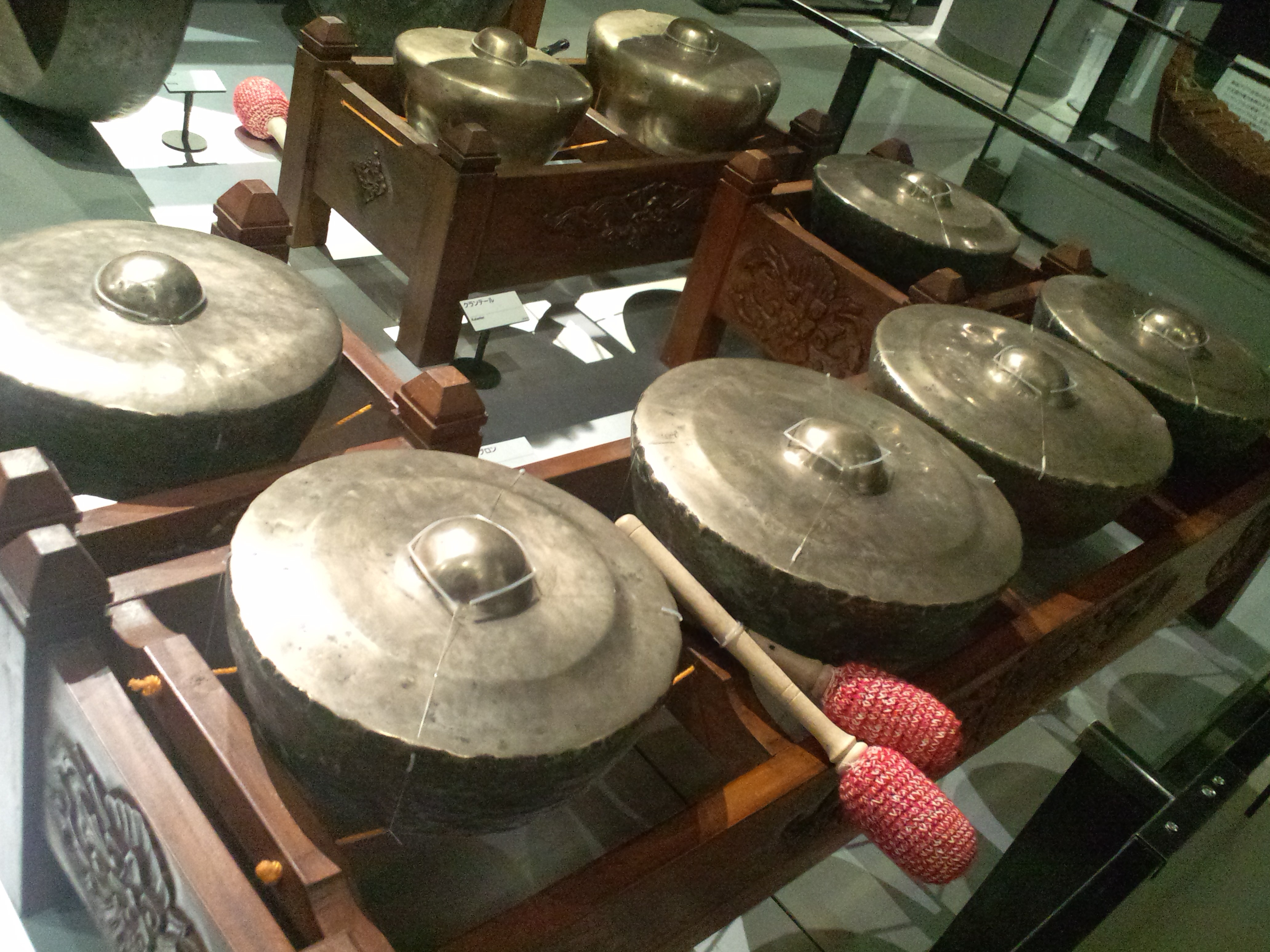 国立民族学博物館（大阪） ガムラン・サレンドロ（インドネシア、スンダ族、2003年収集）